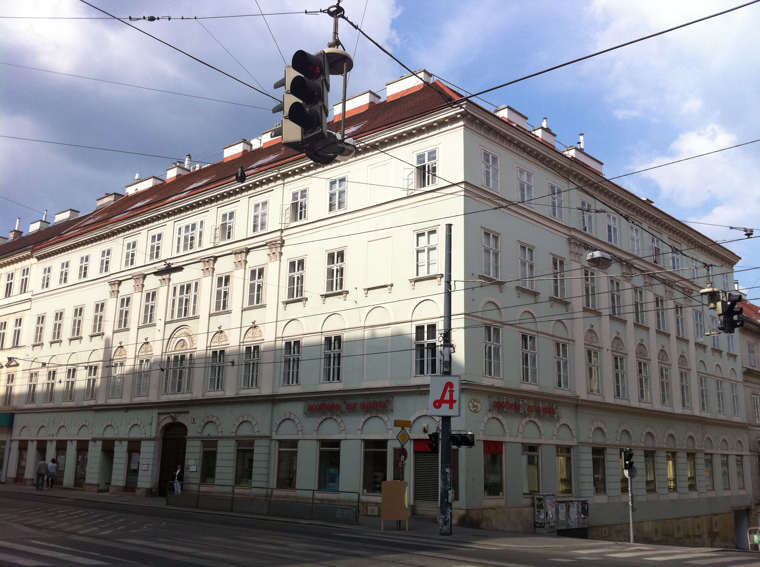 Straßenansicht des Hauses "Zum Kaiser von Österreich"